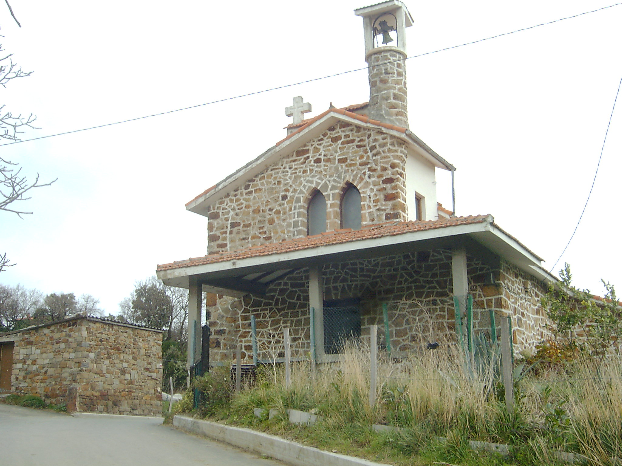 Bermeo demiku auzoko baseliza